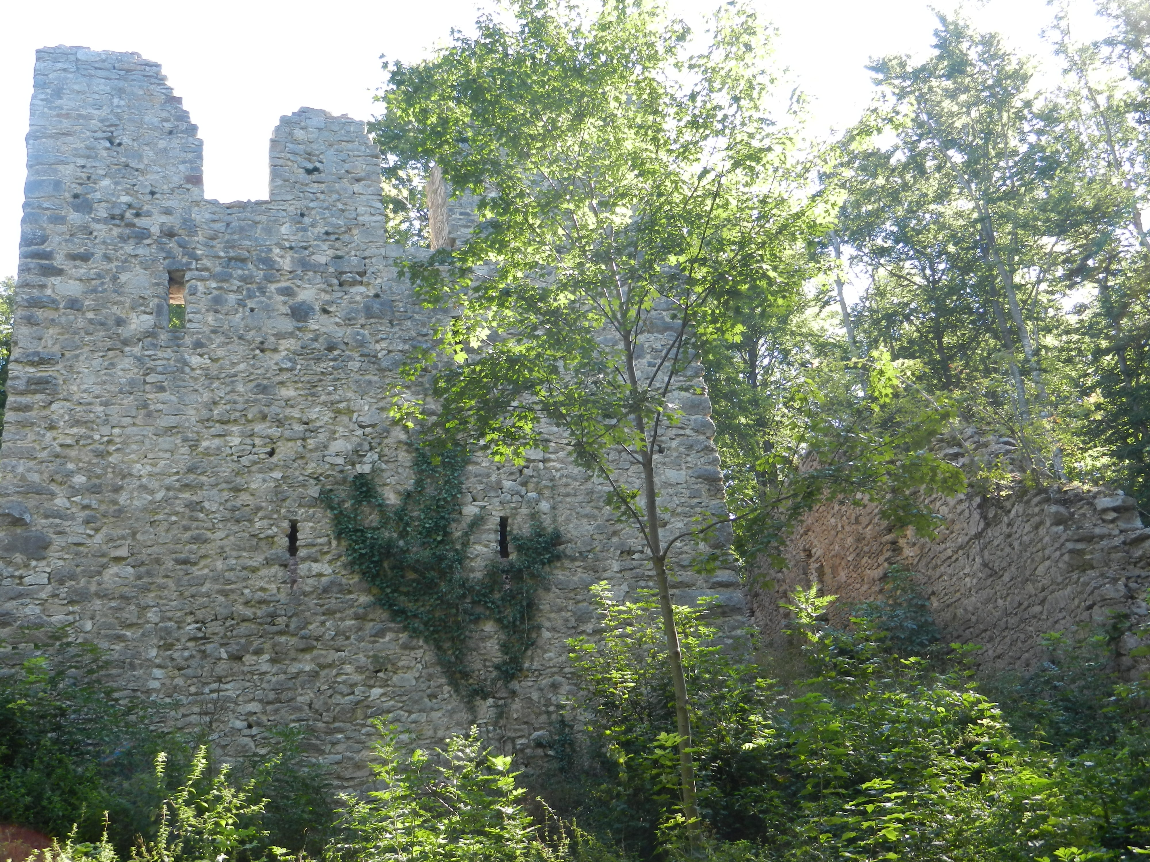 Hohenmelchingen bei Melchingen, Ortsteil von Burladingen, Vorderhaus und Umfassungsmauer